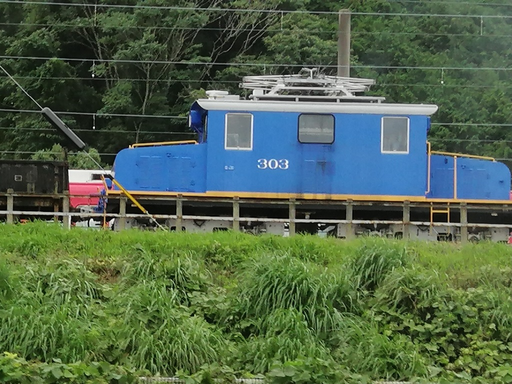 Meitetsu Type Deki 303（列車内から撮影）